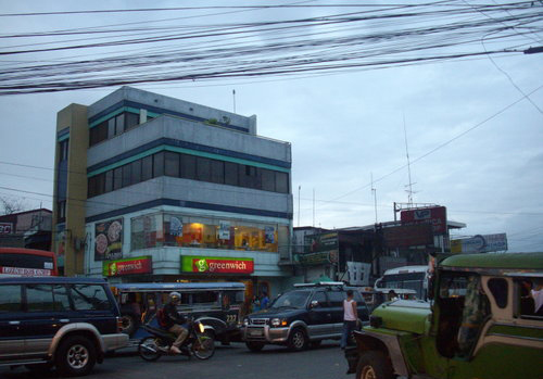 Quirino Highway, Tungkong Mangga 2